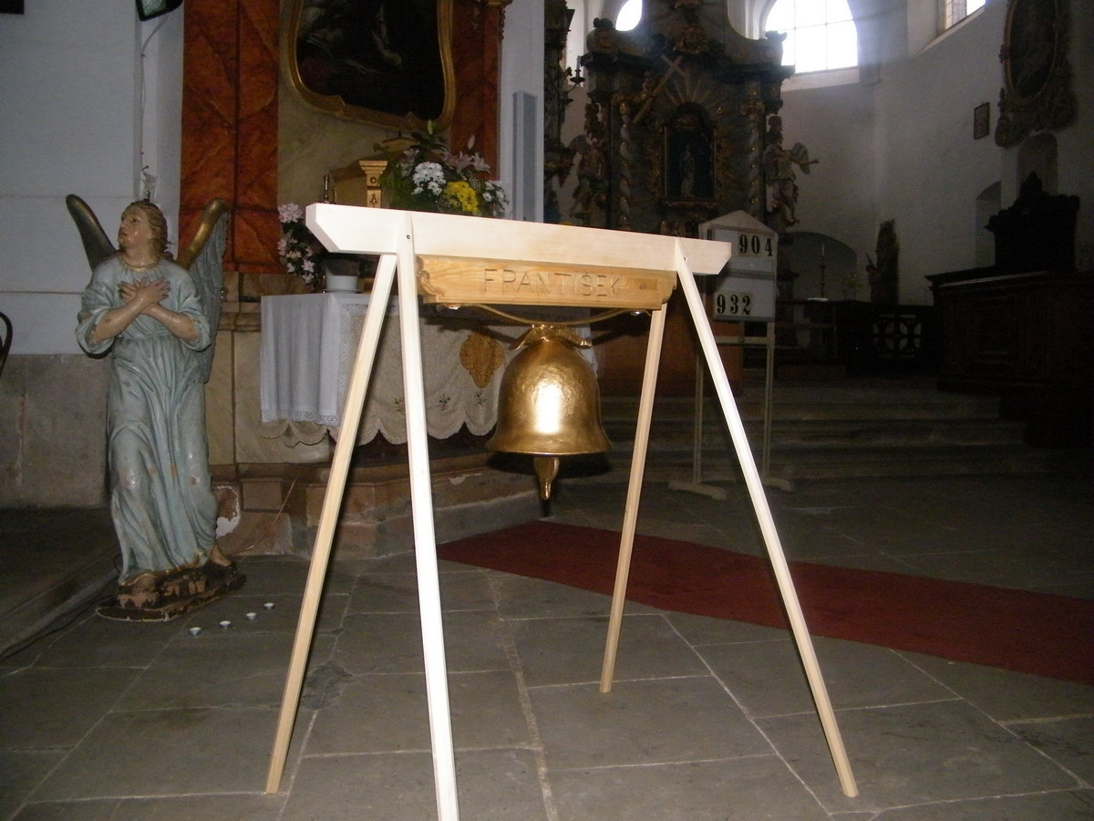 Hřbitovní kostel Nanebevzetí Páně v Mikulášovicích, zvon František